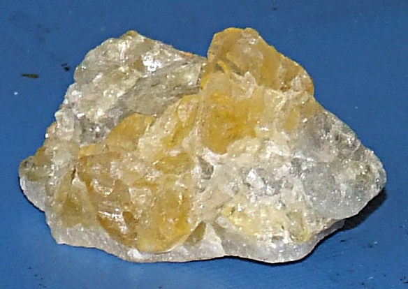 Topas, Schneckenstein (Sachsen)